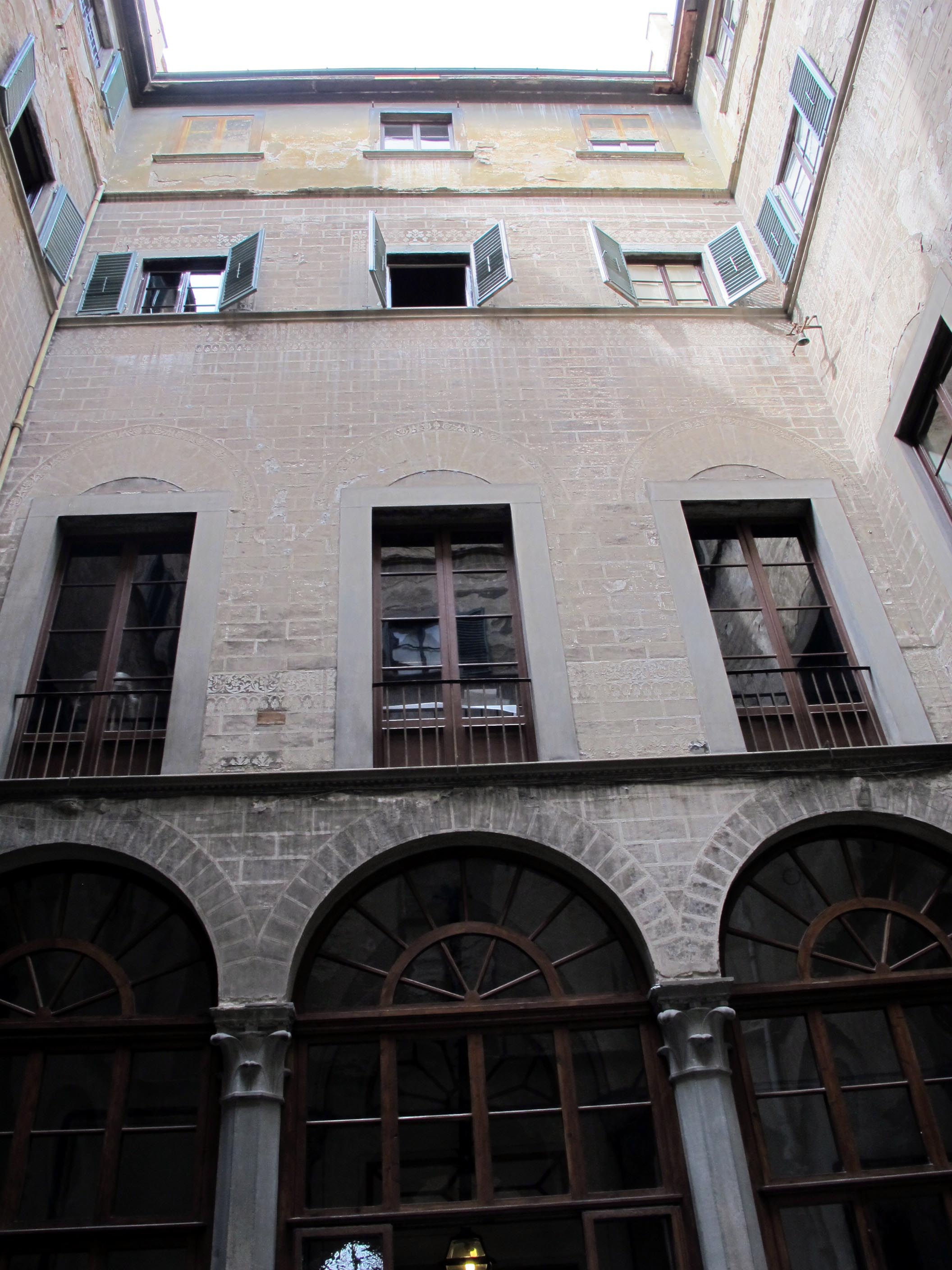 Palazzo capponi delle rovinate, cortile